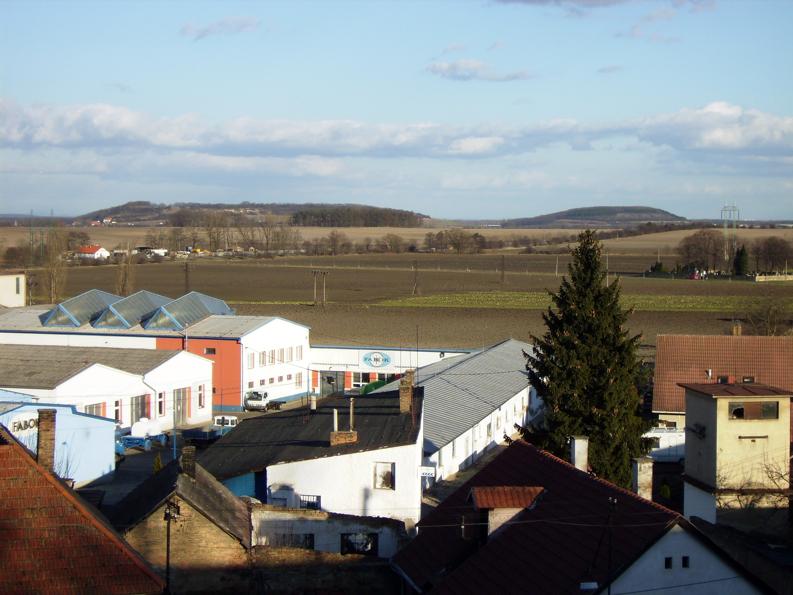 Přerovská a Semická hůra - pohled z návrší u mochovského kostela sv. Bartoloměje